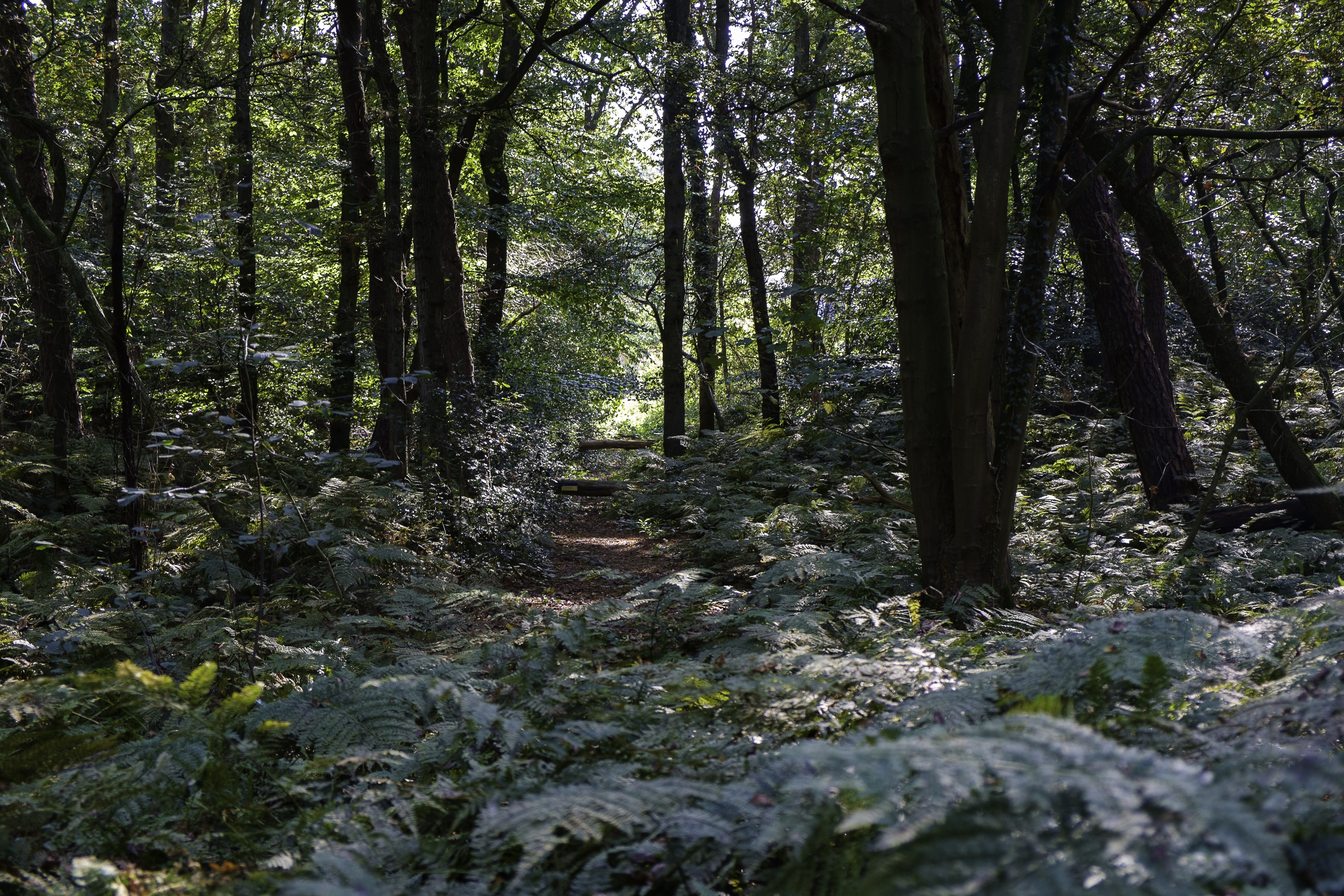 Pad door het Noordlaarderbos